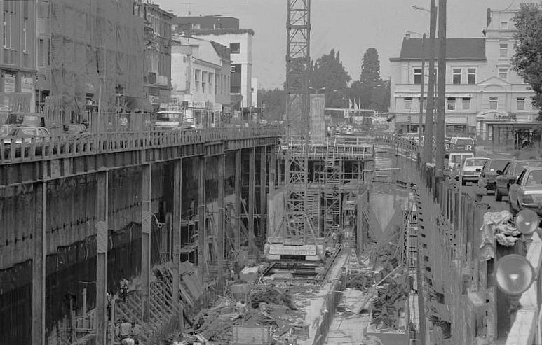 27.7.1989 Bad Godesberg, U-Bahn-Baustelle in der Moltkestraße (B9) Verlängerung der Straßenbahnstrecke von der Rheinallee bis zur Godesberger Stadthalle